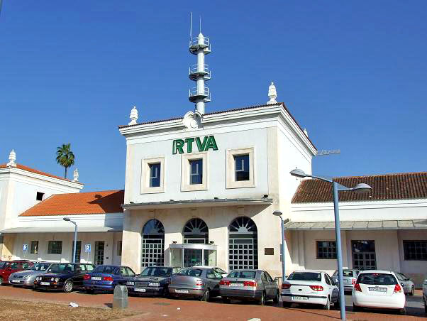 Antigua Estación de Tren y Sede de RTVA en Córdoba, España